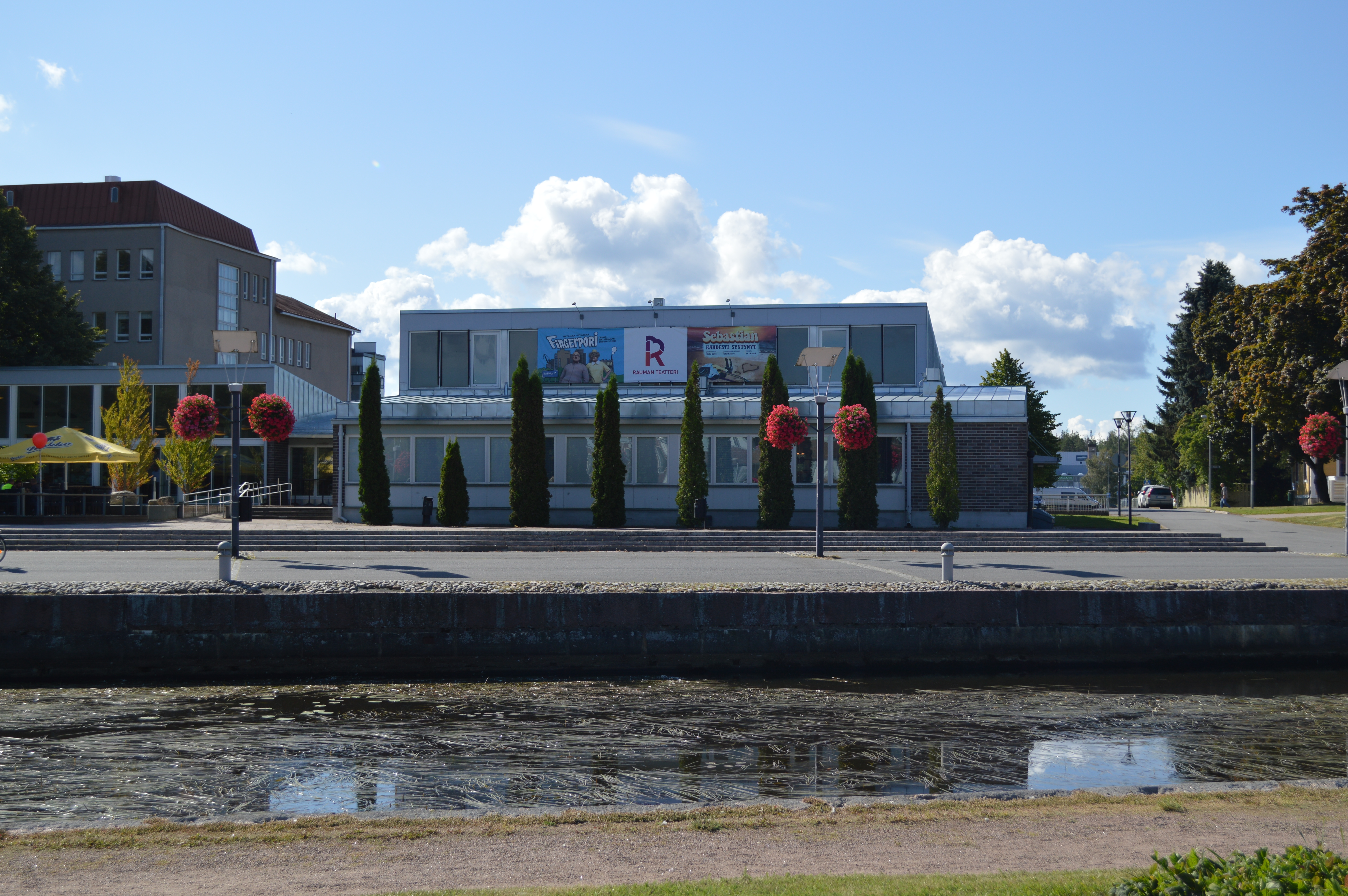 Rauman teatteritalo